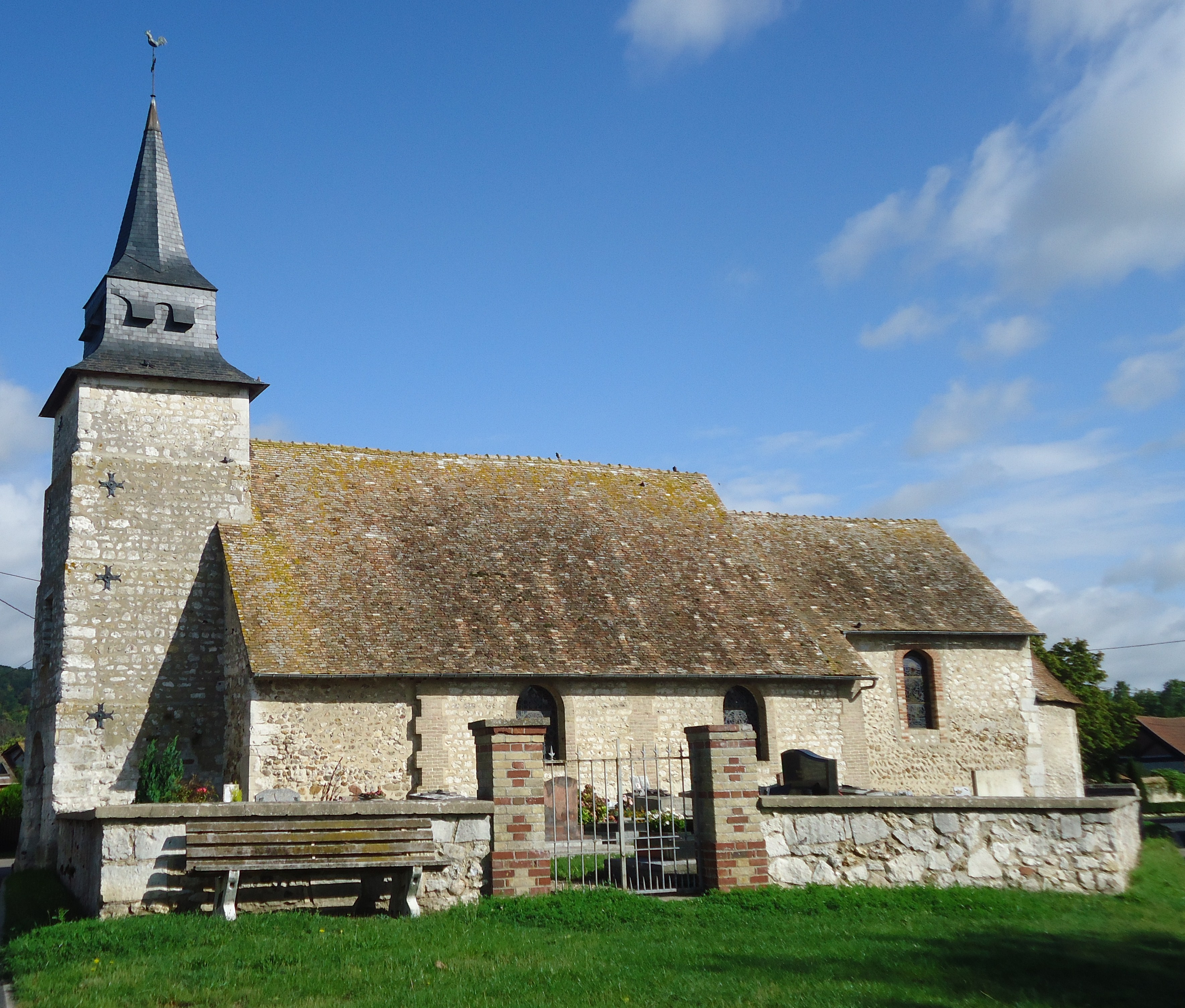 Eglise Saint-Denis - Bernières-sur-Seine - Eure (27)